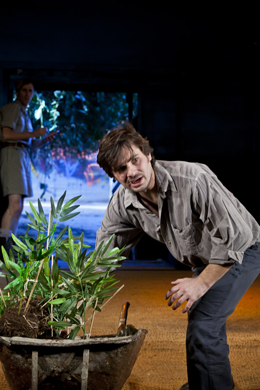 דניאל צ'רניש ב"בין לילה ובין שחר" בבימויו של סלבה מלצב